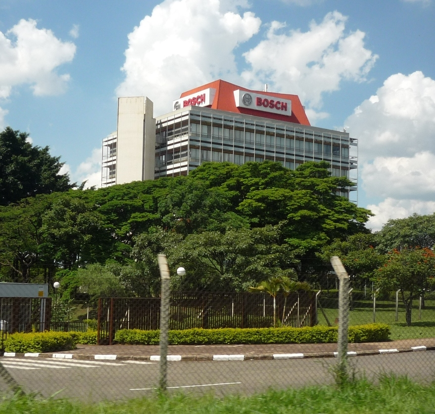 Robert Bosch Ltda in Campinas